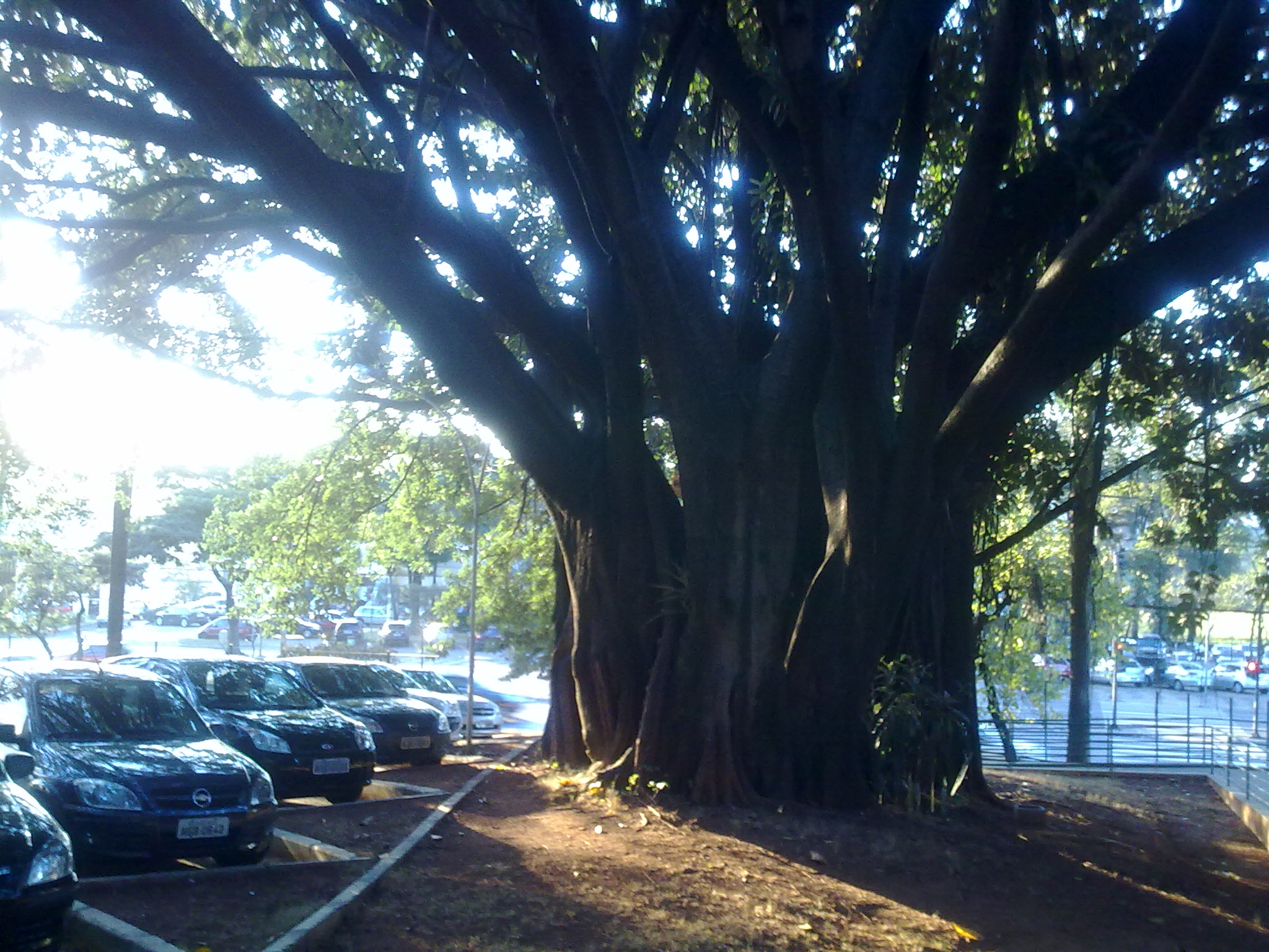 Antiga árvore no campus II do Centro Federal de Educação Tecnológica de Minas Gerais, em Belo Horizonte.